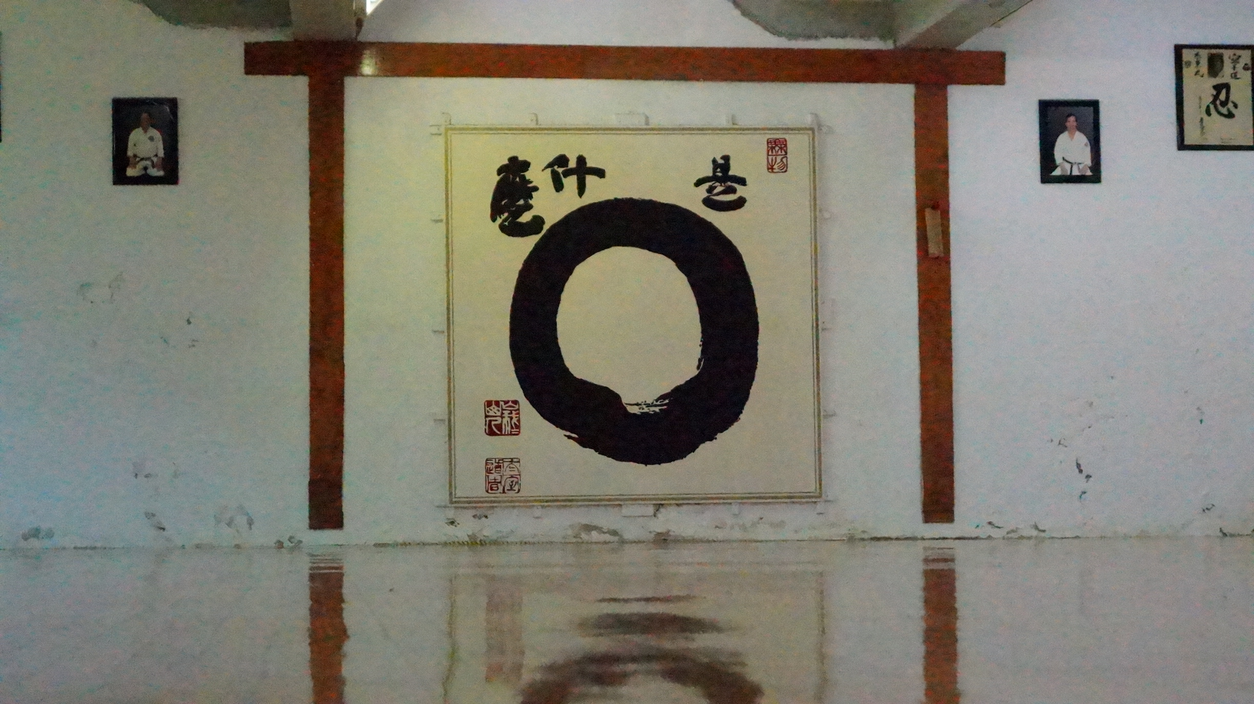 Una fotografía del Dojo en el ex Recinto de atletas de la UNAM.